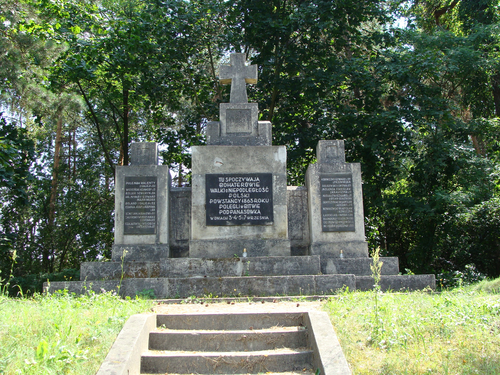 Pomnik poległych w bitwie pod Panasówką w 1863 r. (wyjazd ze Zwierzyńca na Biłgoraj)